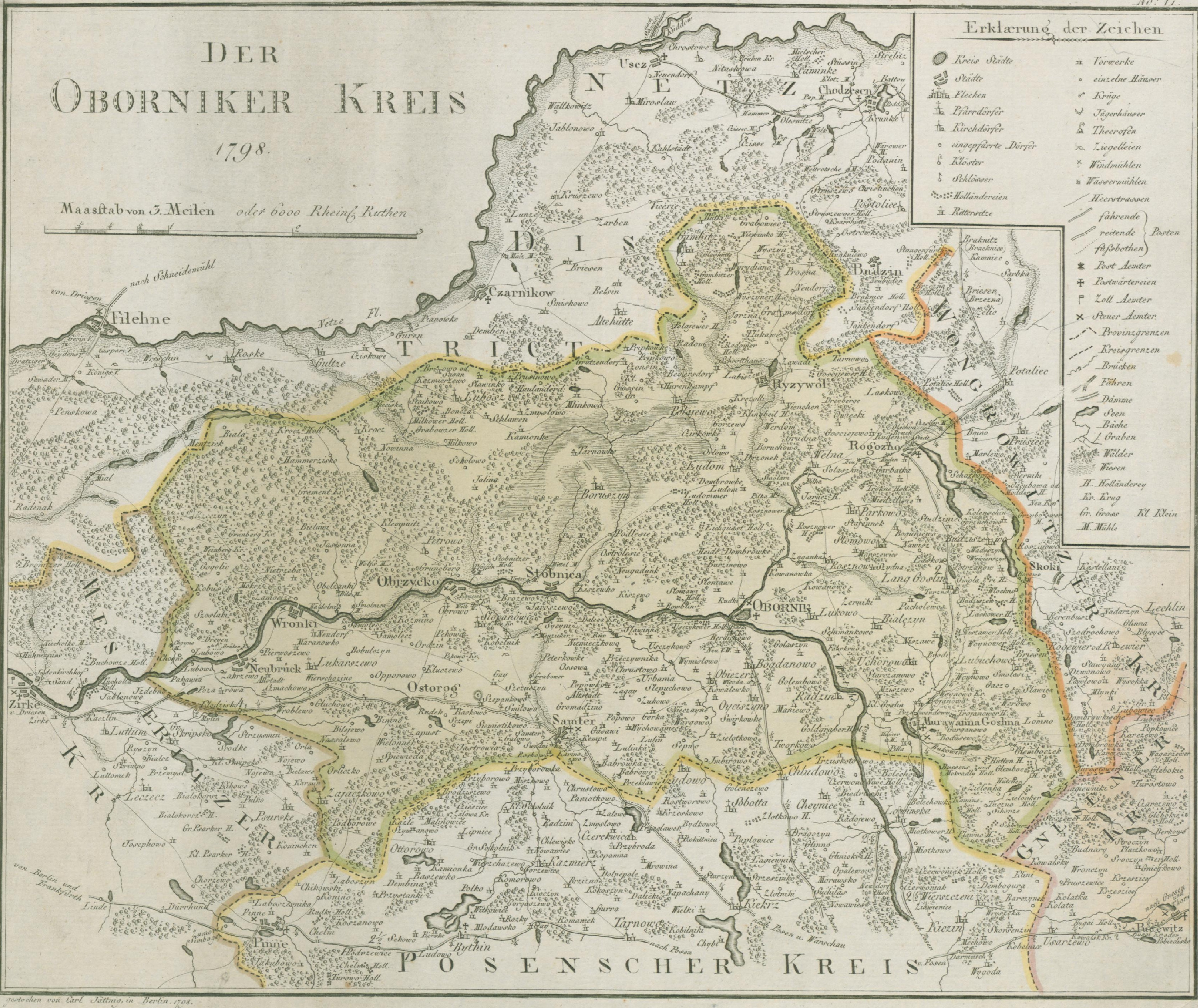 Map of "Kreis Obornik" as of 1798